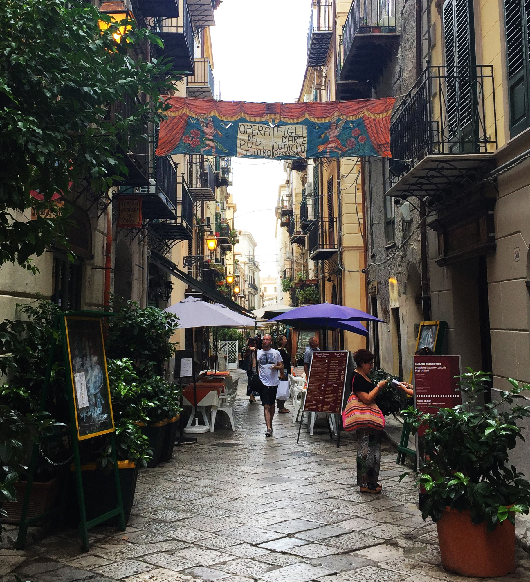 via bara all'olivella - palermo teatro dei pupi di mimmo cuticchio